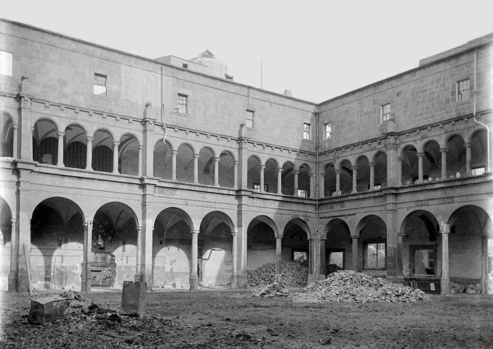 Imatge